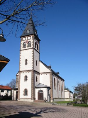 Die Buker Kirche This is a photograph of an architectural monument.